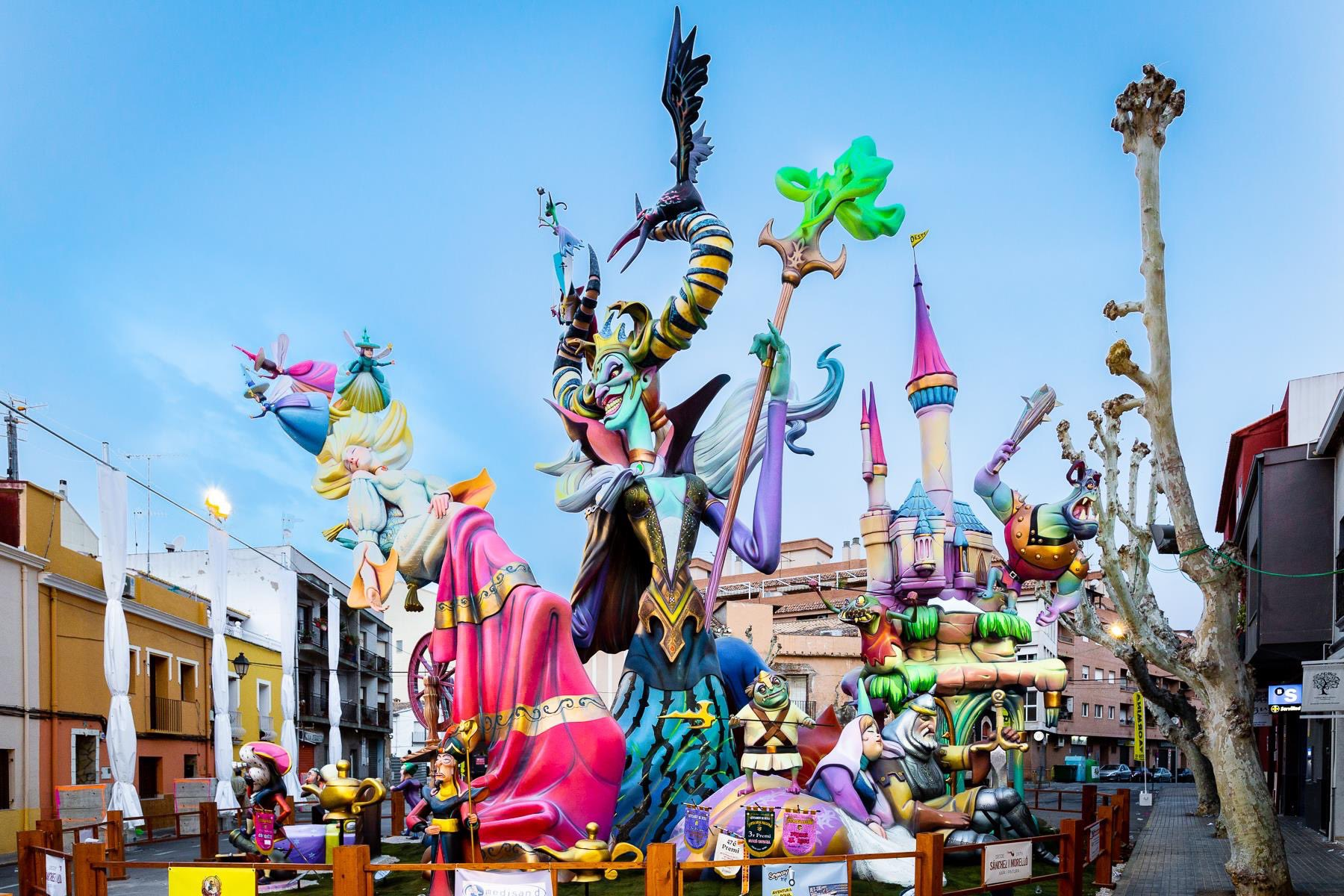 Falla gran 2019 de la Falla Oeste de Dénia feta per Palacio i Serra